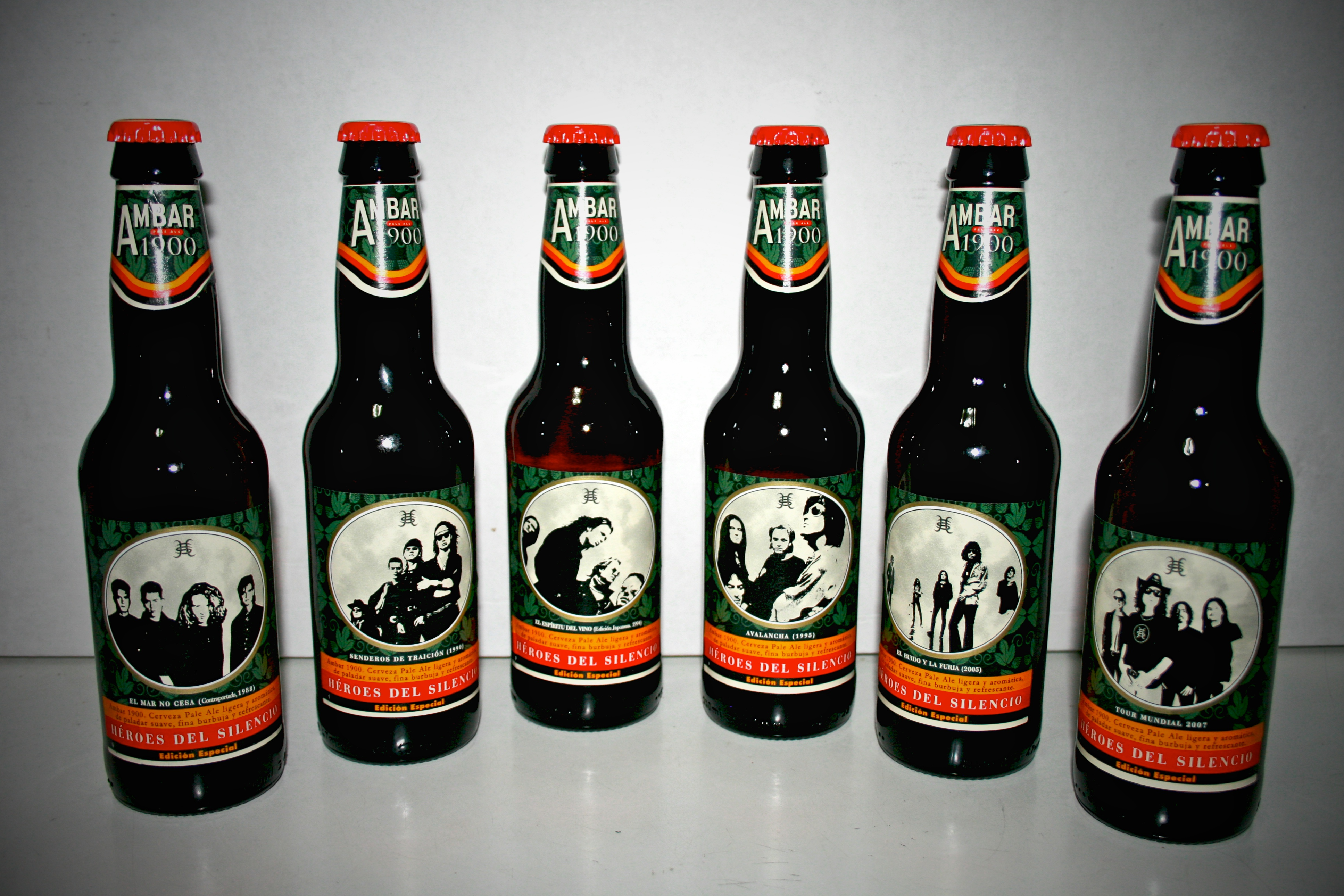 Botellas de la edición especial "Héroes del Silencio" de cerveza Ambar, Zaragoza (España)